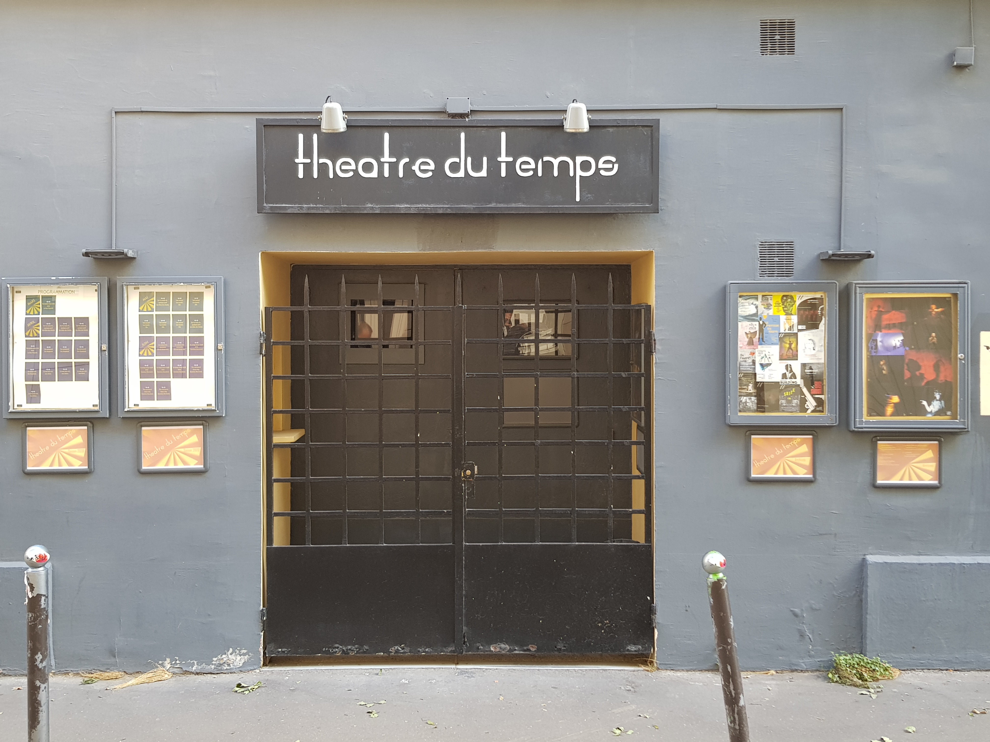 9, rue du Morvan, Paris 11e.